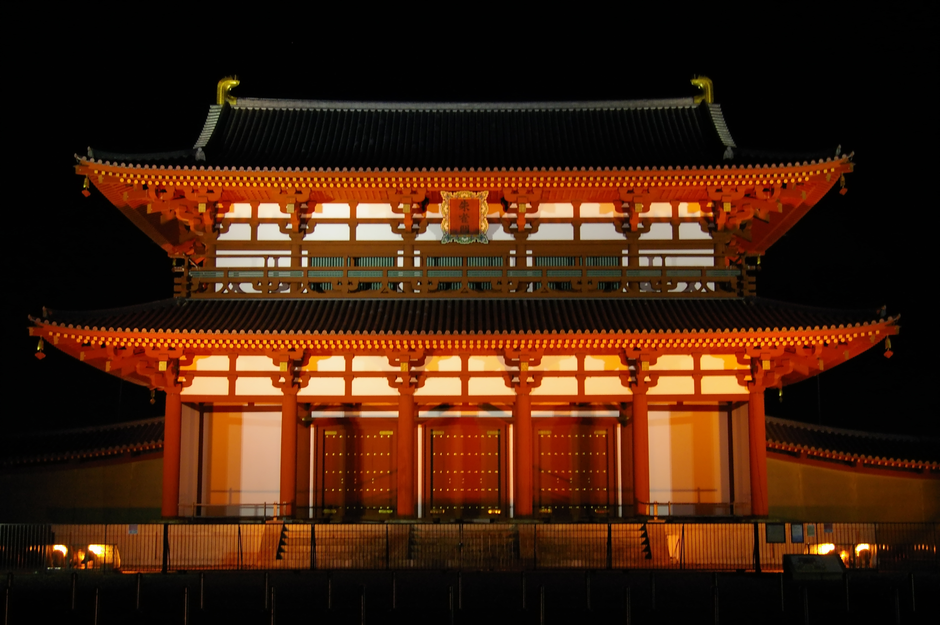 Suzakumon_Heijokyo